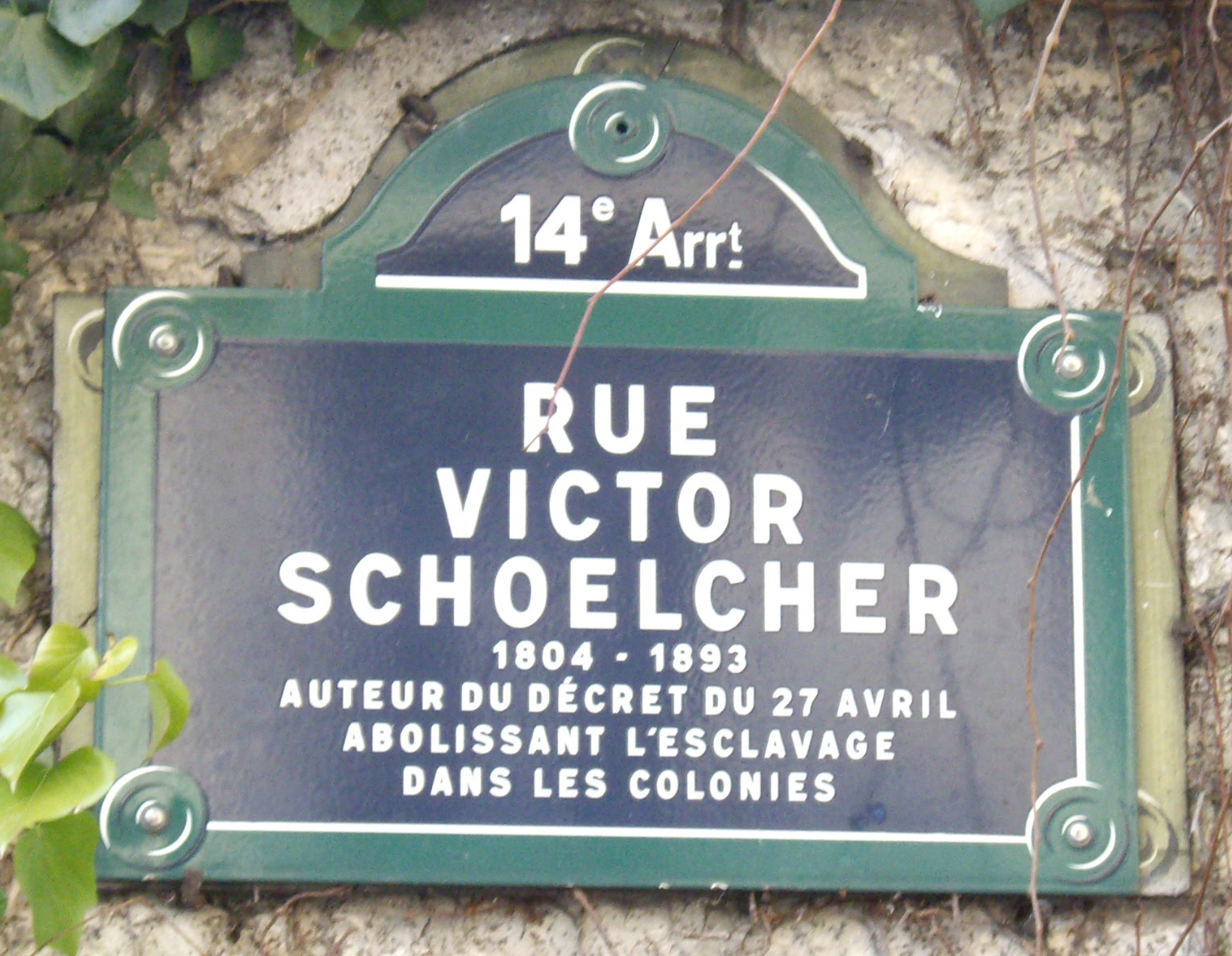 Plaque de la rue Victor-Schoelcher, Paris 14e, en mémoire du ministre antiesclavagiste Victor Schoelcher (1804-1893).